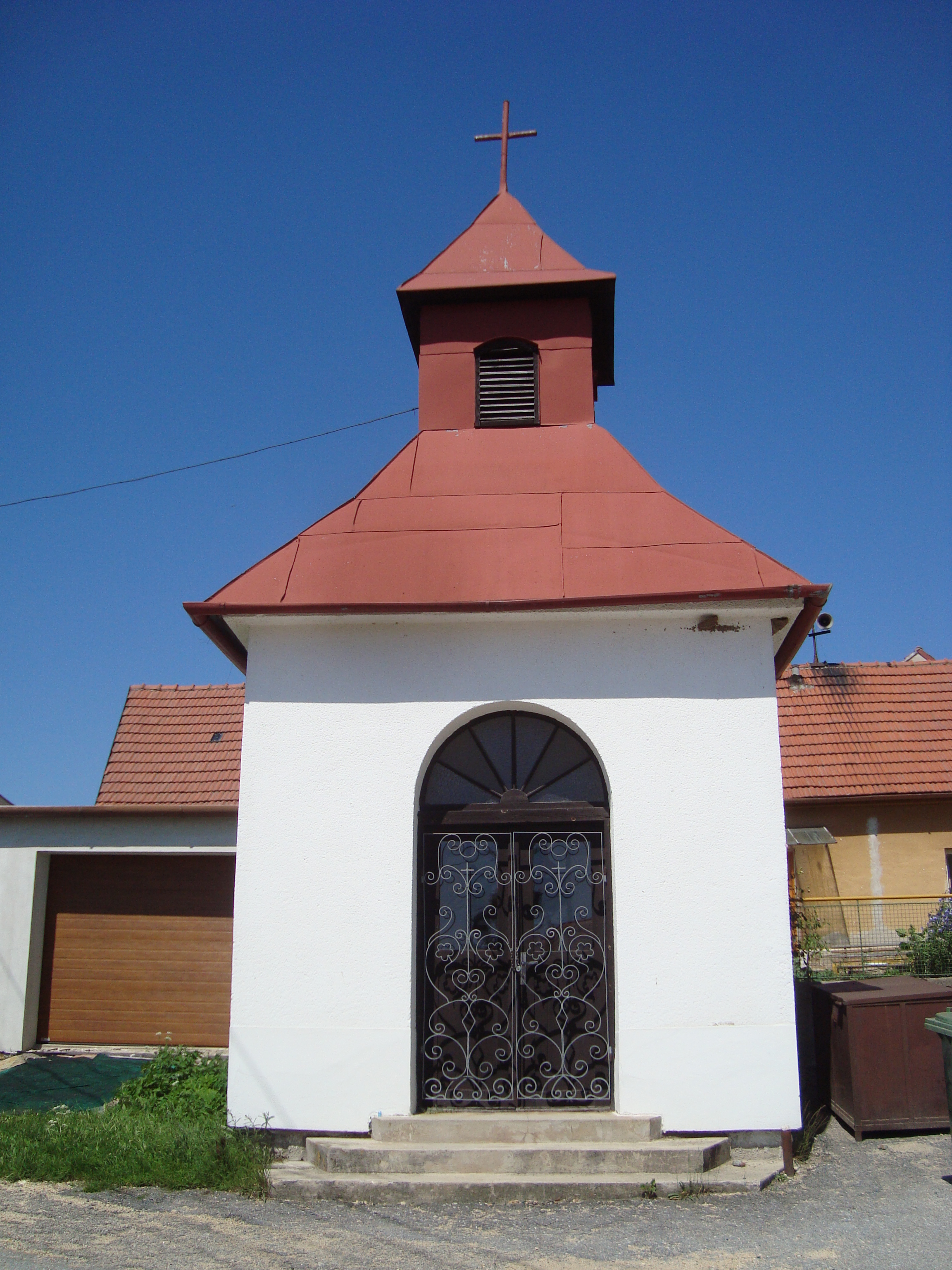 Litostrov zvonička